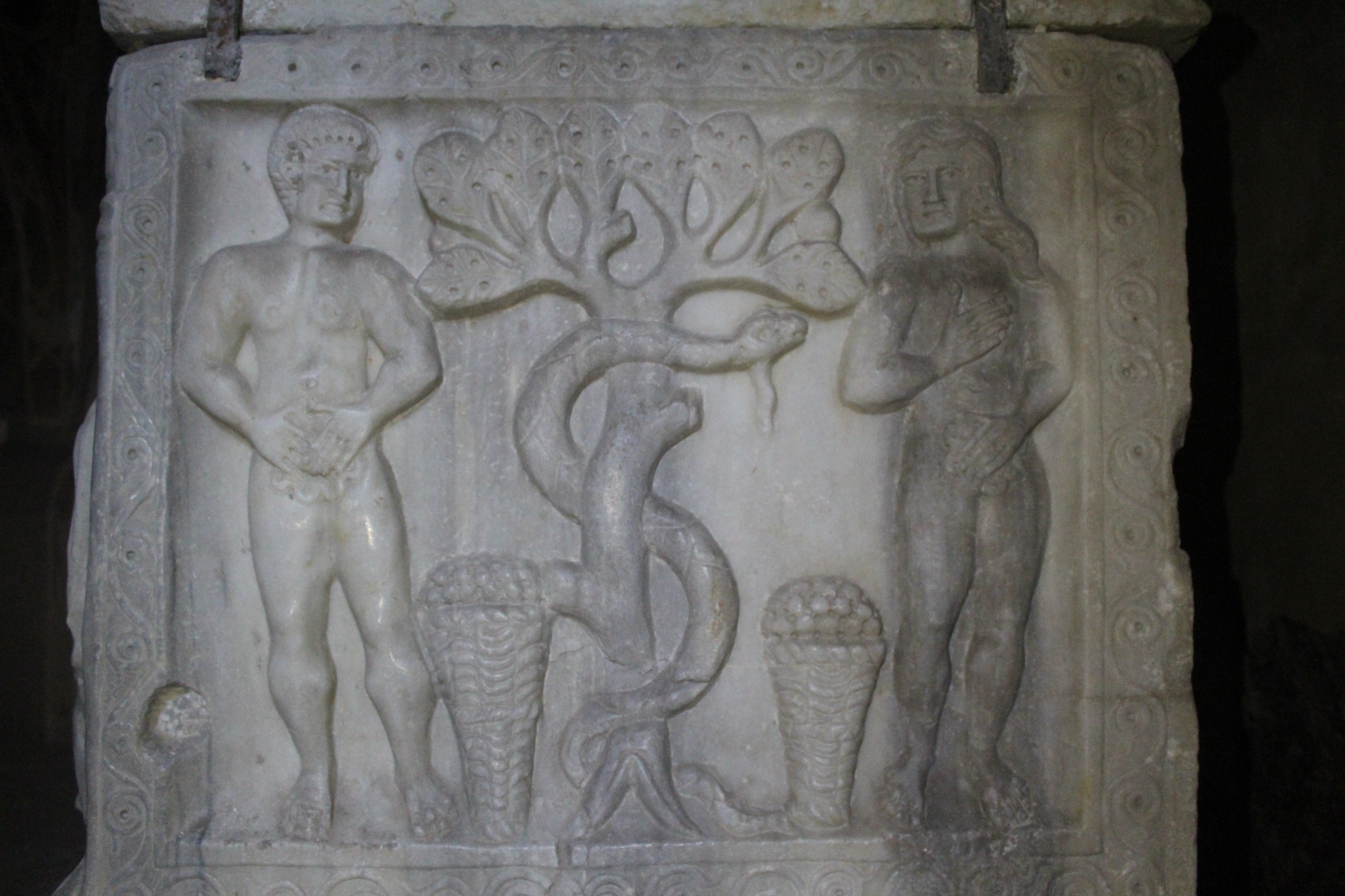 Sarcofago del IV secolo conservato nella cripta della chiesa di San Giovanni in Valle a Verona